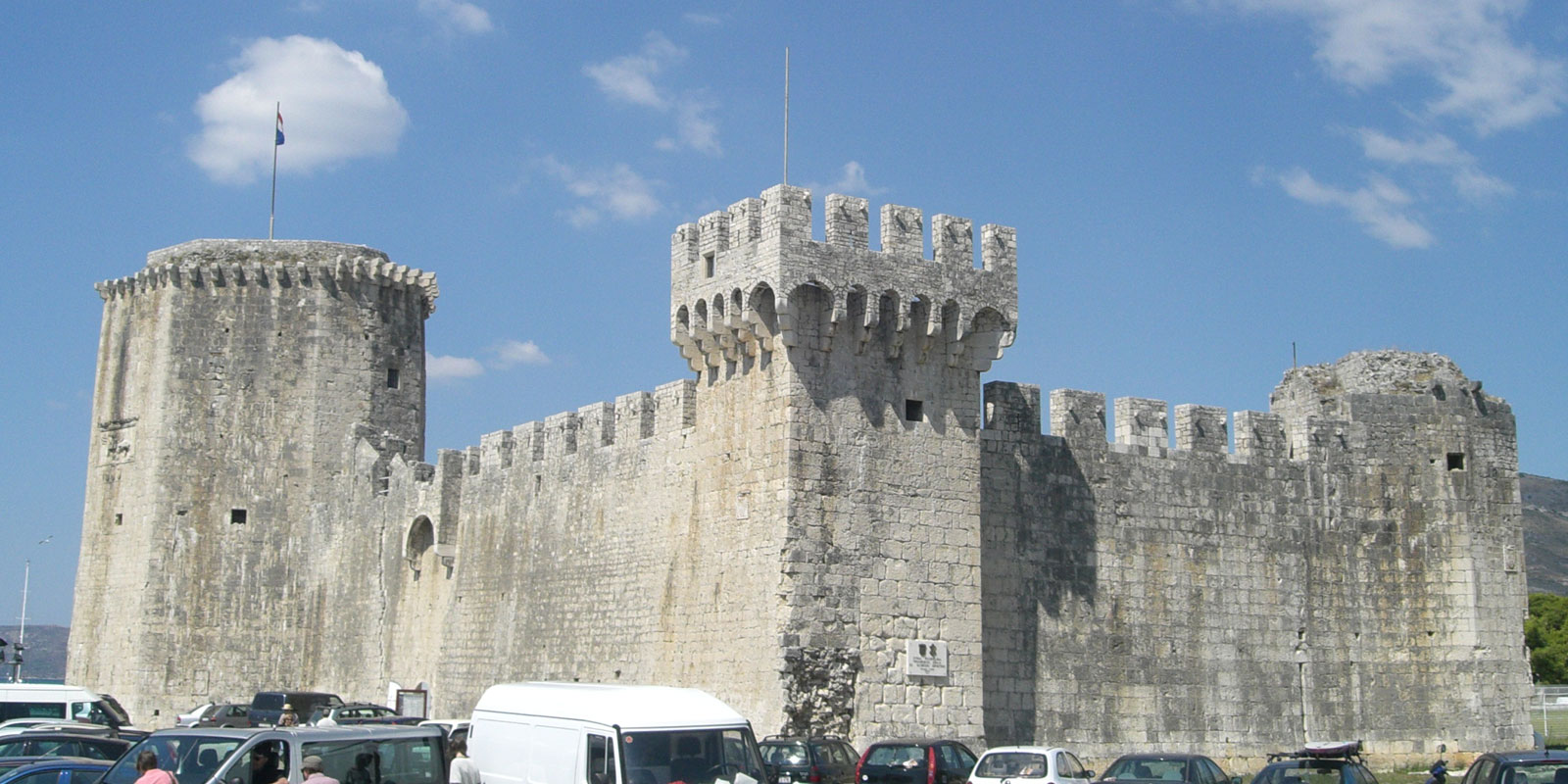 Trogir: Kula Kamerlengo